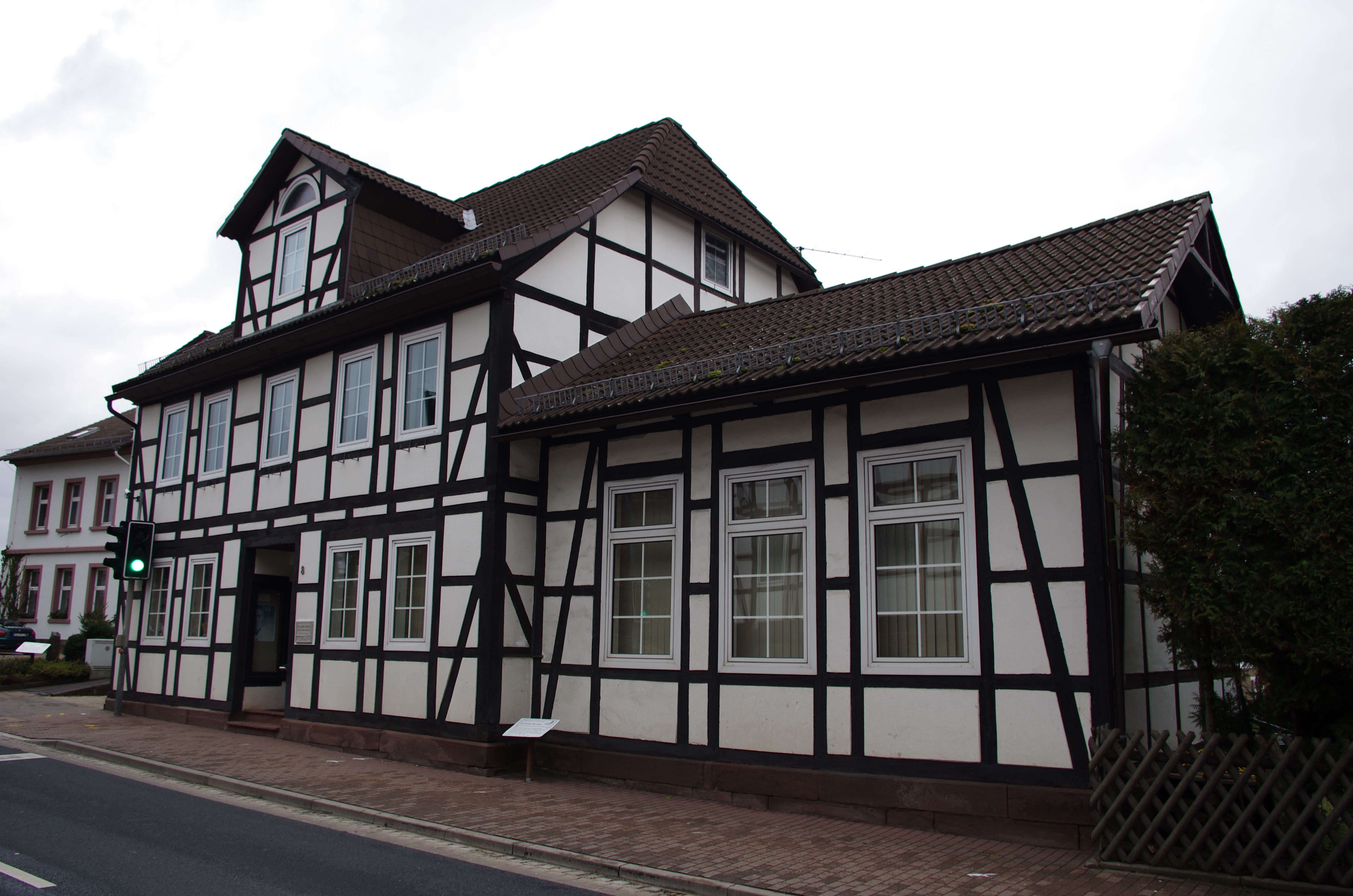 Das Geburtshaus des Dichters Otto Elster in Eschershausen. Links liegt das Rathaus.